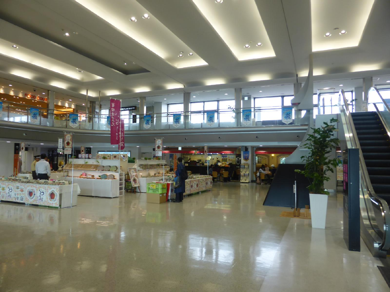 2F出発階から3Fのフードコーナーを望む